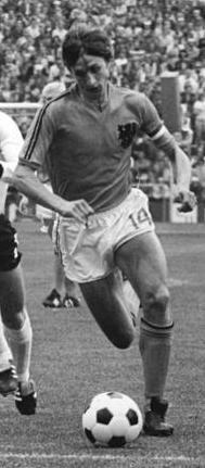 Johan Cruijff während der Fußball-Weltmeisterschaft-Endspiel BRD gegen Niederlande am 7.7.74